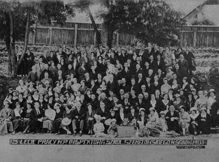 Jubileusz 25-lecia pracy inspektora szkolnego Antoniego Szemelowskiego (Sanok, 1933). Autor fotografii: Leon Gottdank.